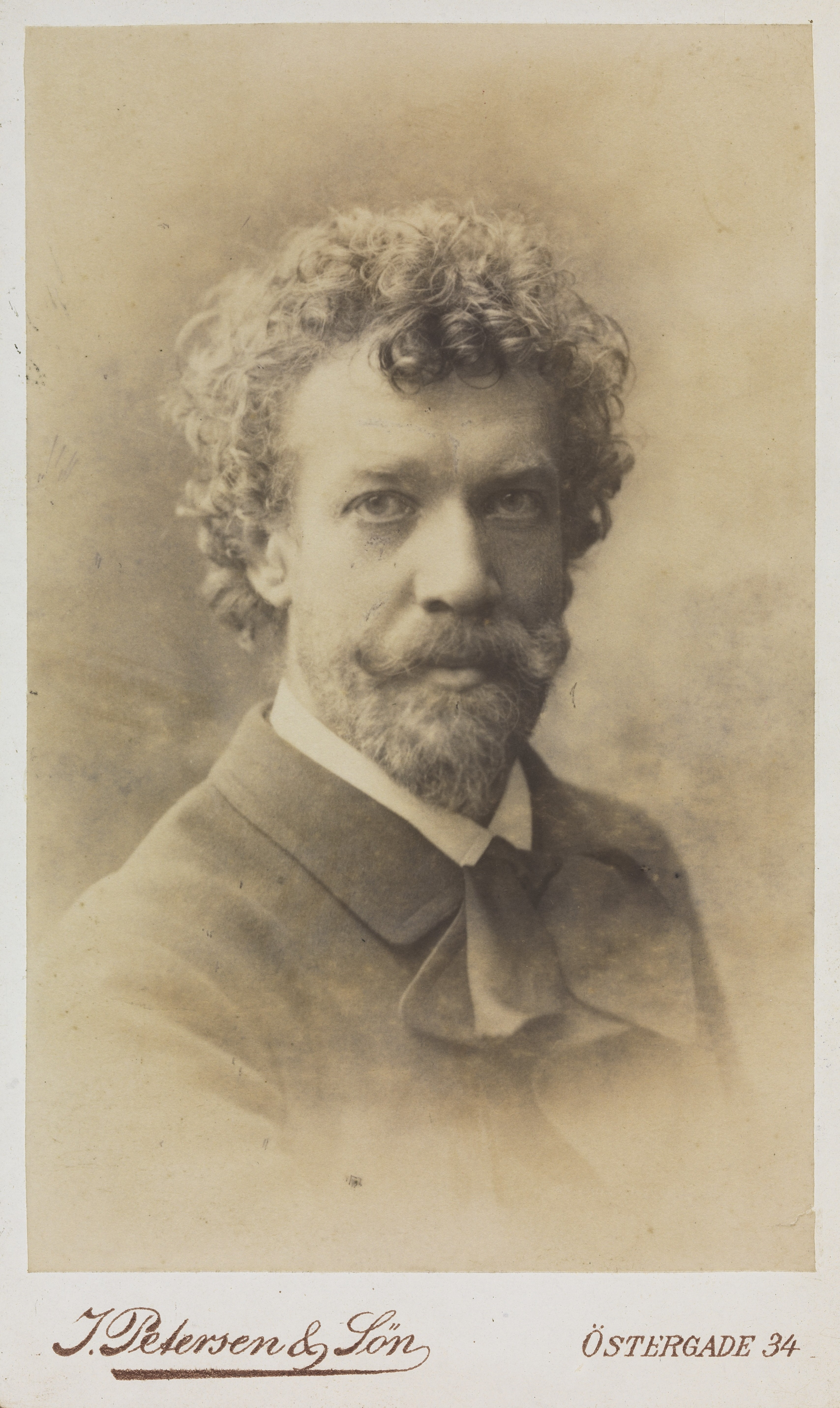 Anton Svendsen. Med dedikasjon. Depicted person: Svendsen, Anton Depicted place: Danmark, København